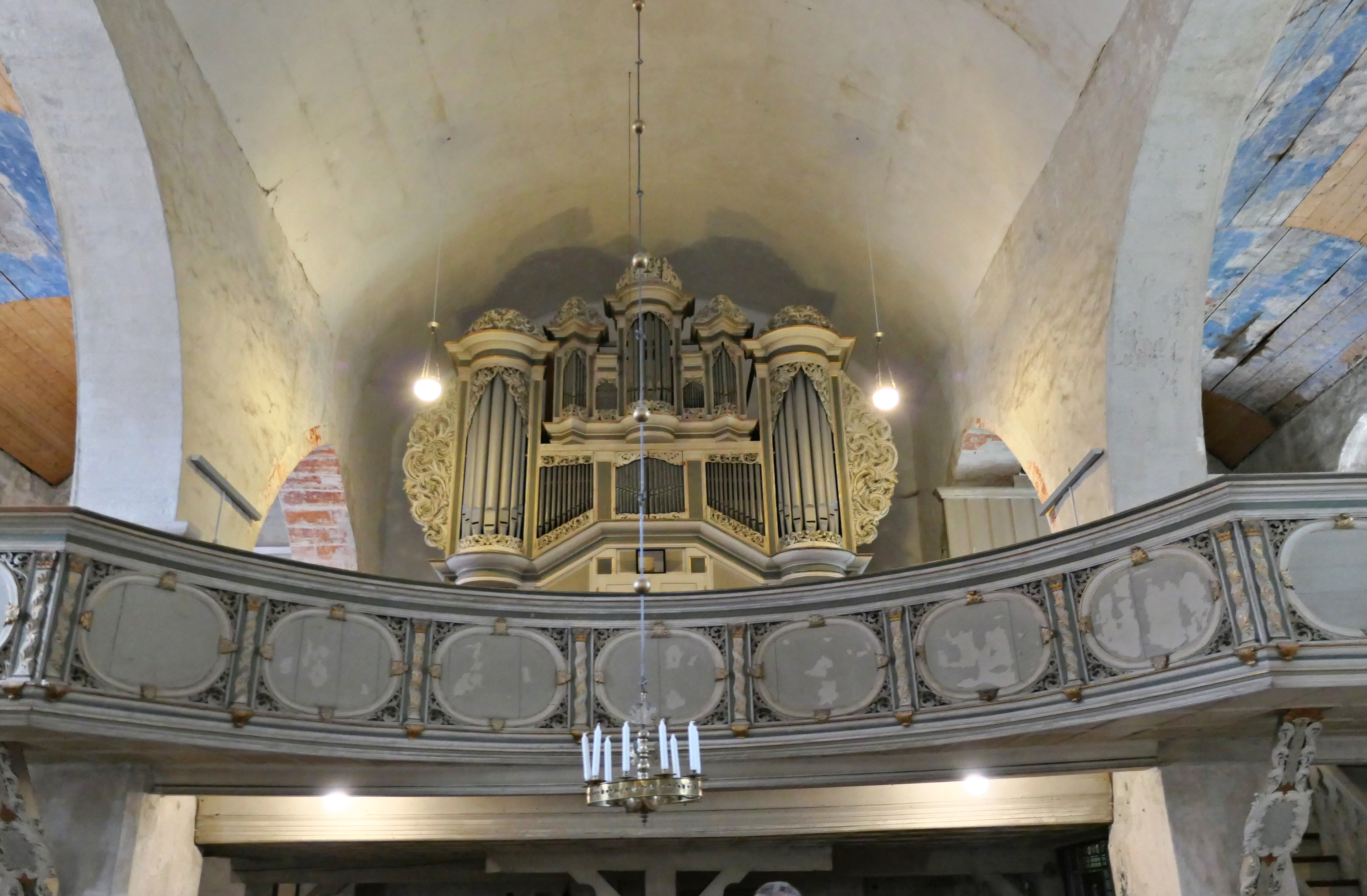 St. Aegidii Quedlinburg, Landkreis Harz, Sachsen-Anhalt, Deutschland